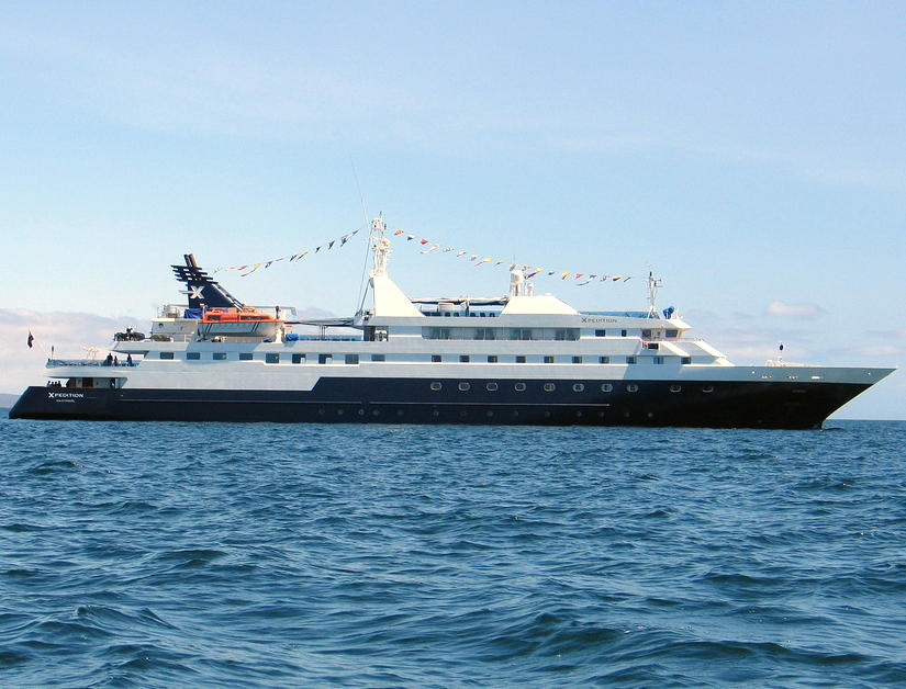 Le Celebrity Xpedition de l'opérateur Celebrity Cruises aux Galapagos